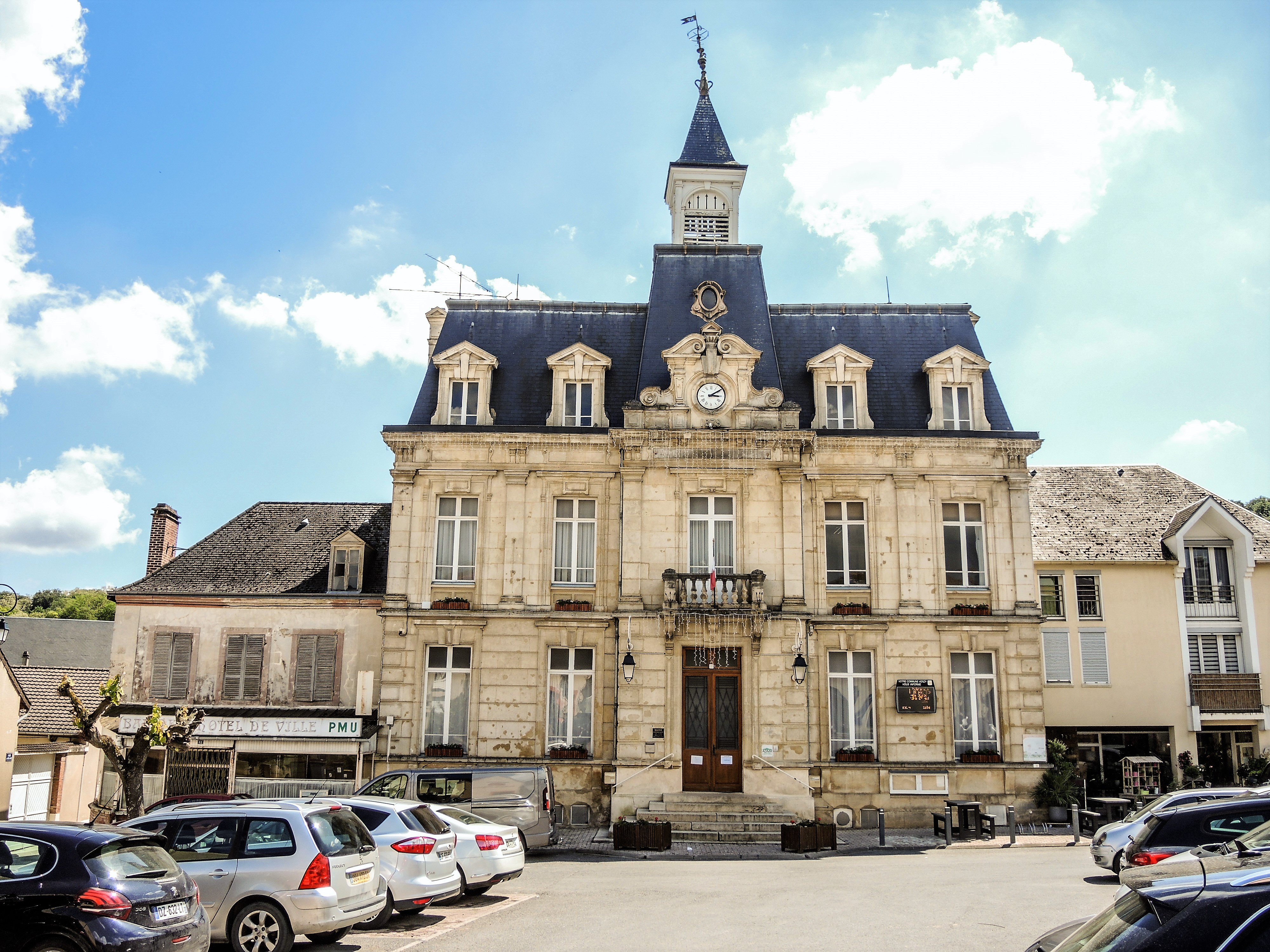 Façade de la mairie de Verzy. Marne